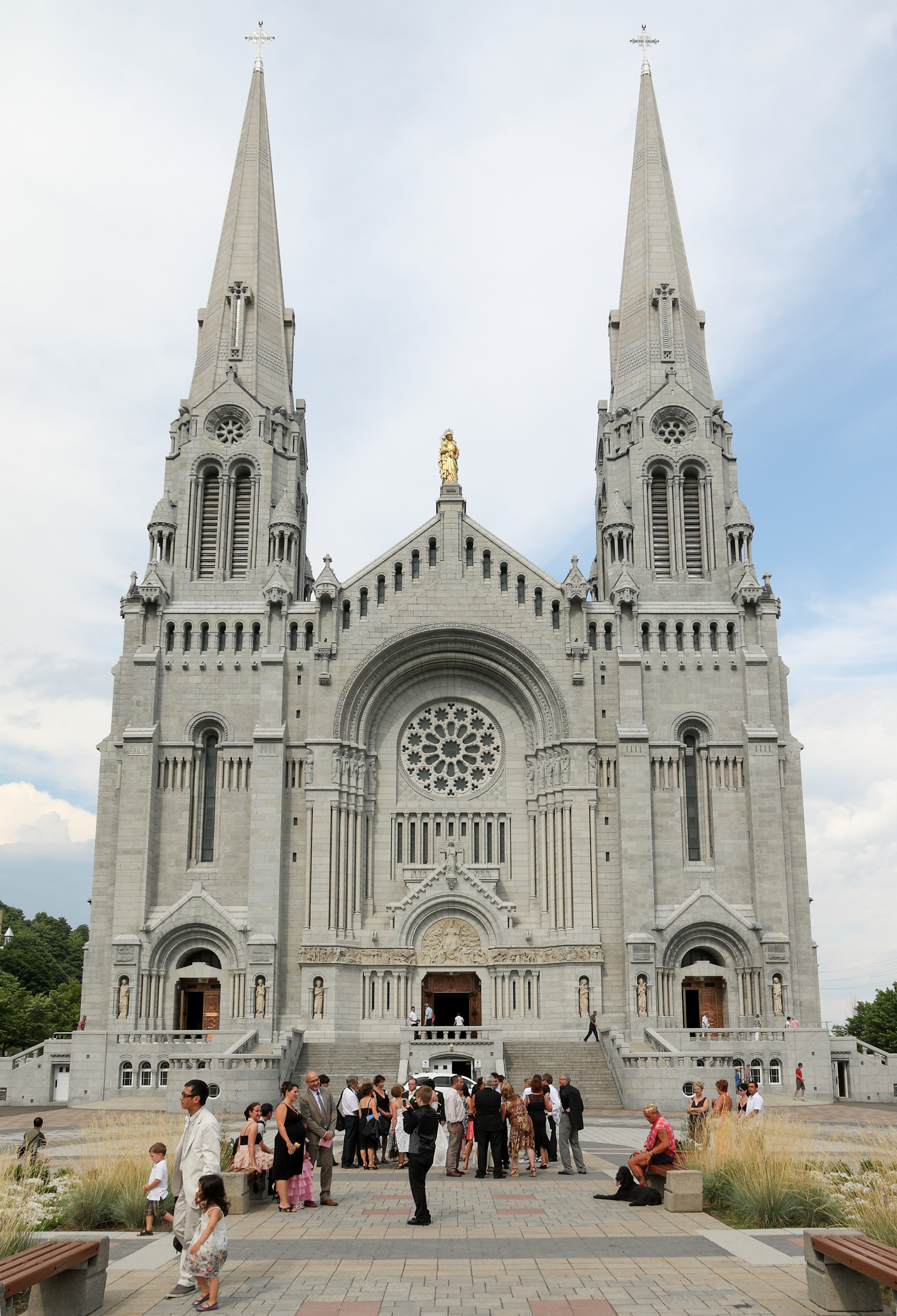 Basilique de Sainte-Anne-de-Beaupré